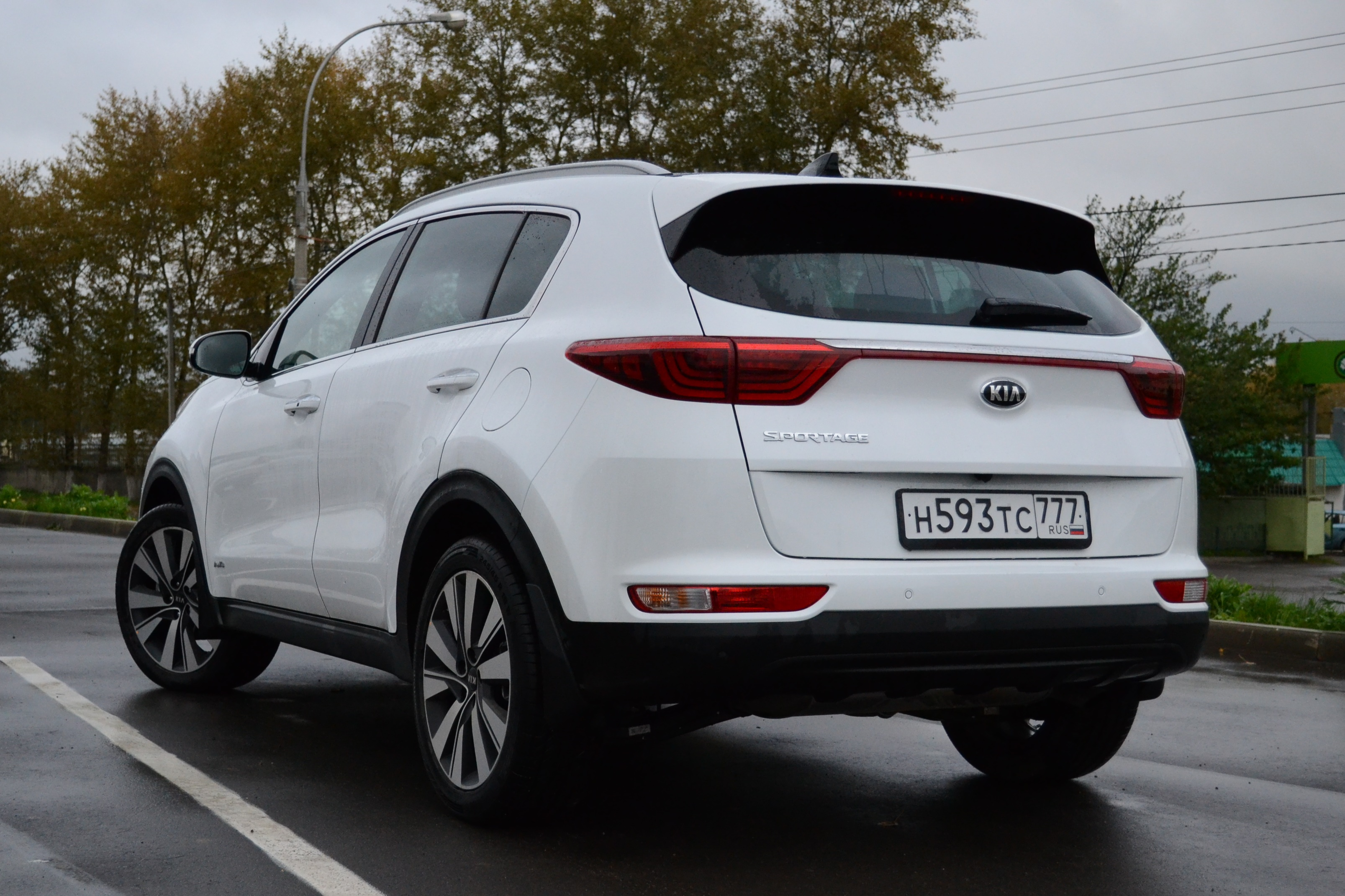 Кроссовер Kia Sportage (QL)